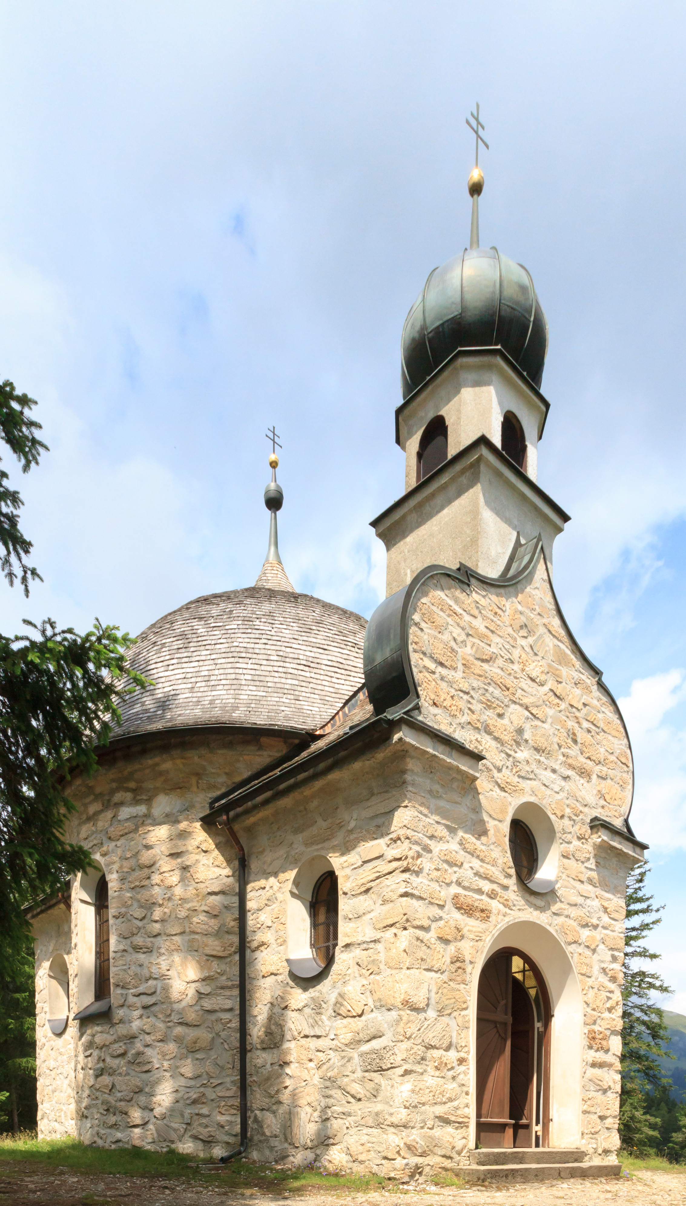 Obernbergersee- Kapelle